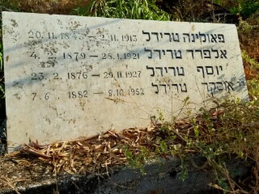 קברי משפחת טריידל במושבה כנרת צילום אלי אלון